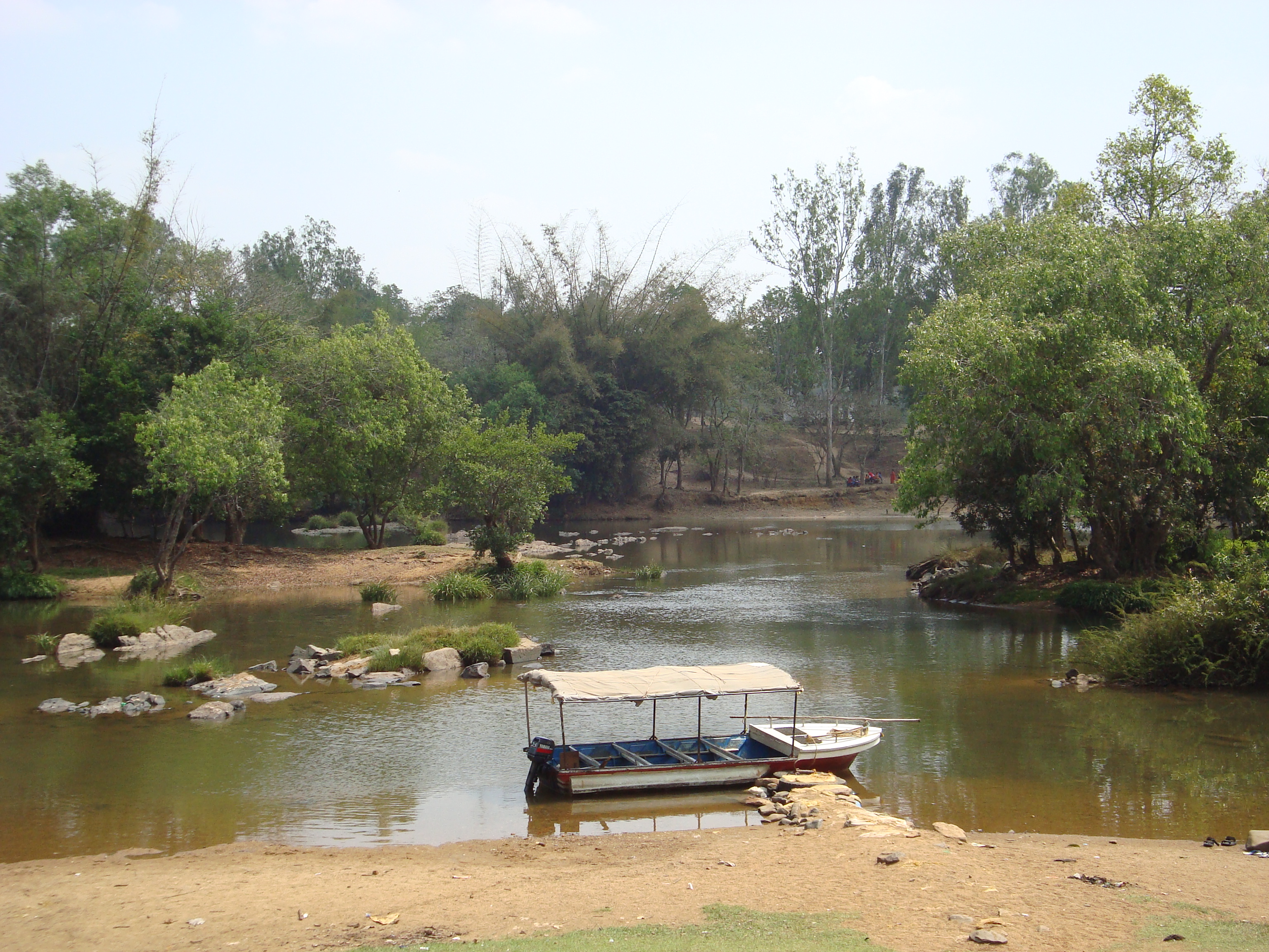 Dubare elephant camp near Madikeri